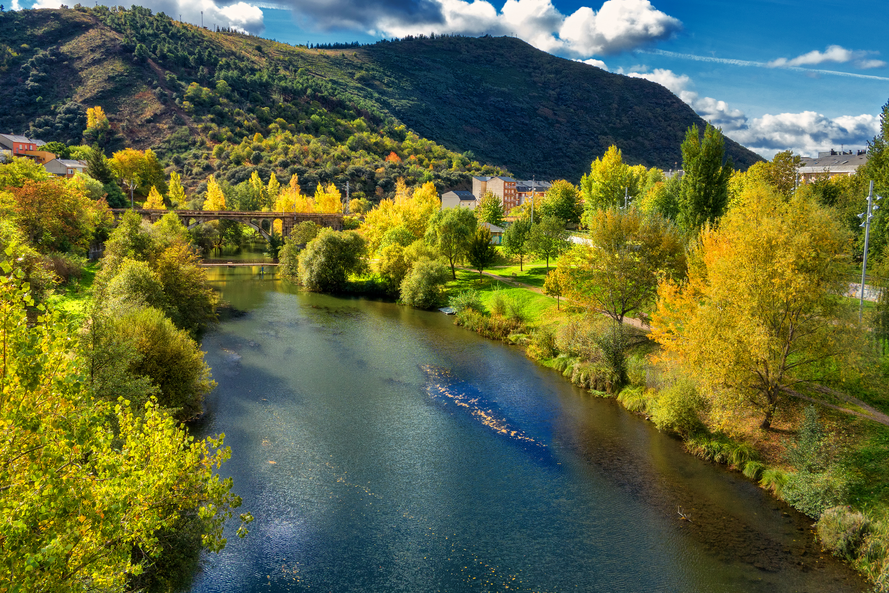 El Bierzo, León (Spain)